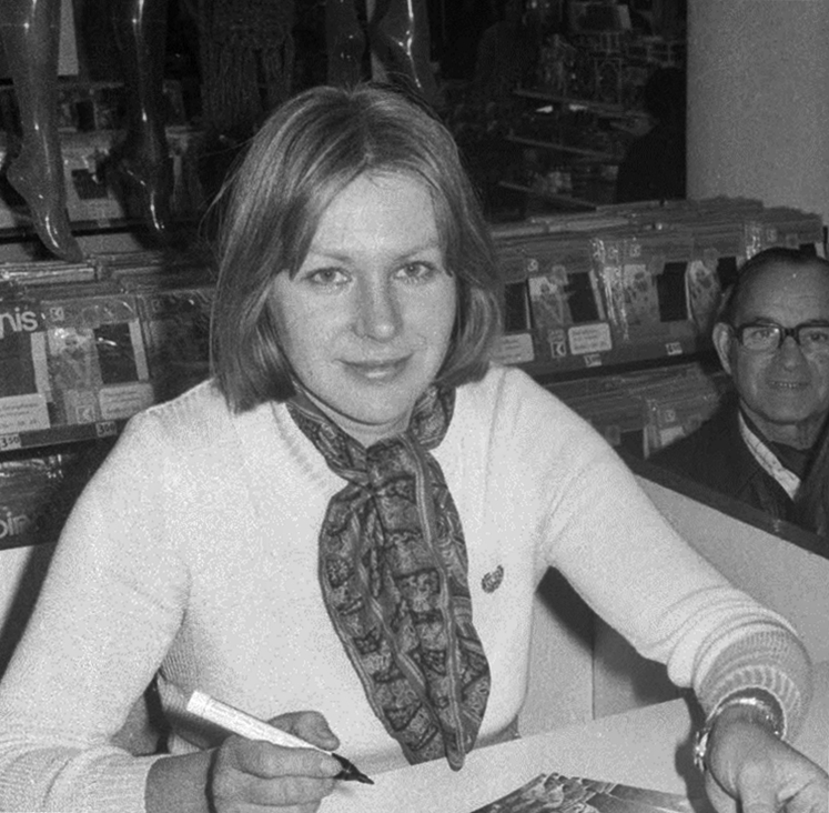 im Kaufhaus Karstadt.